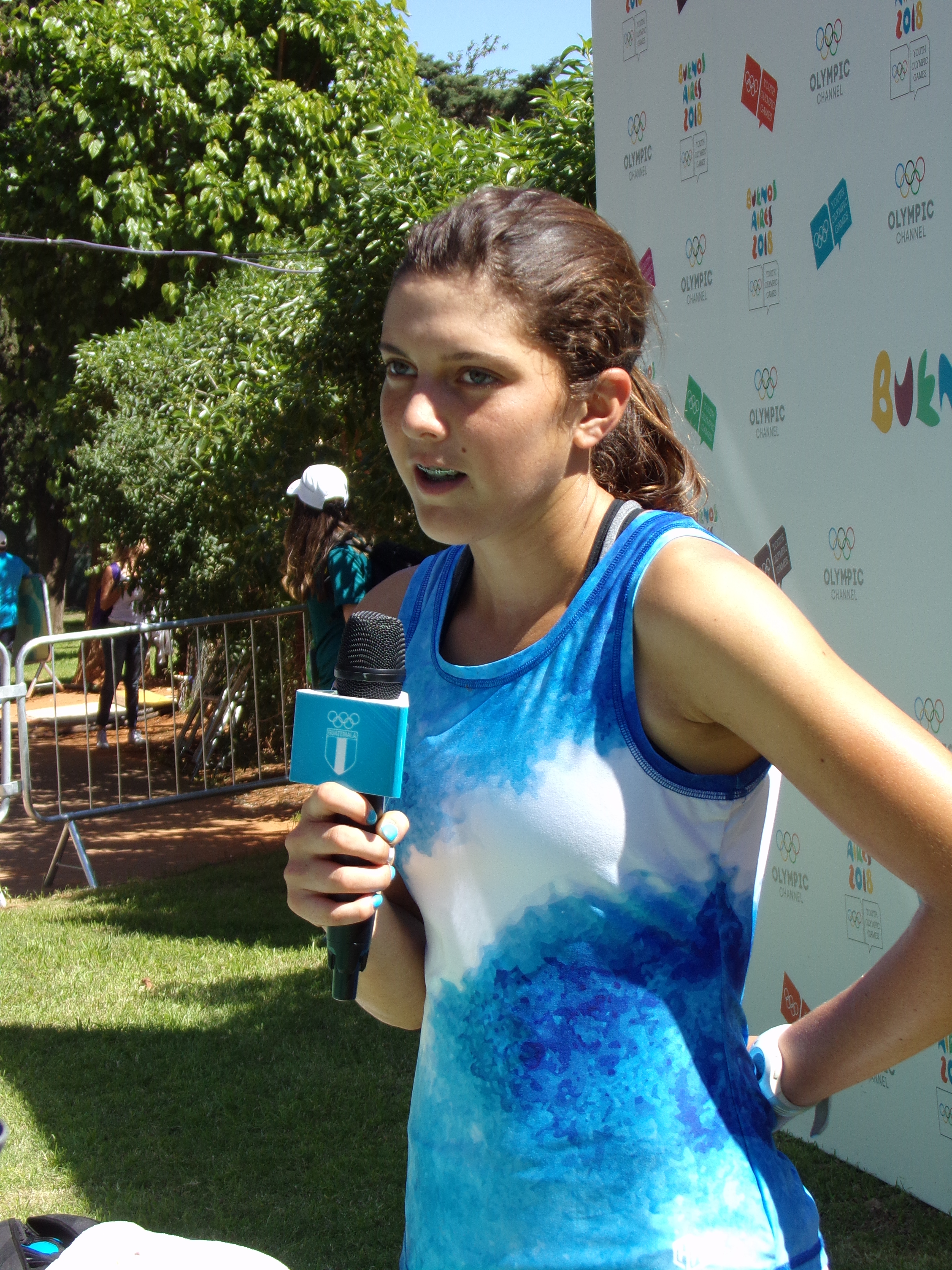 Maria Gabriela Rivera Corado en Buenos Aires 2018